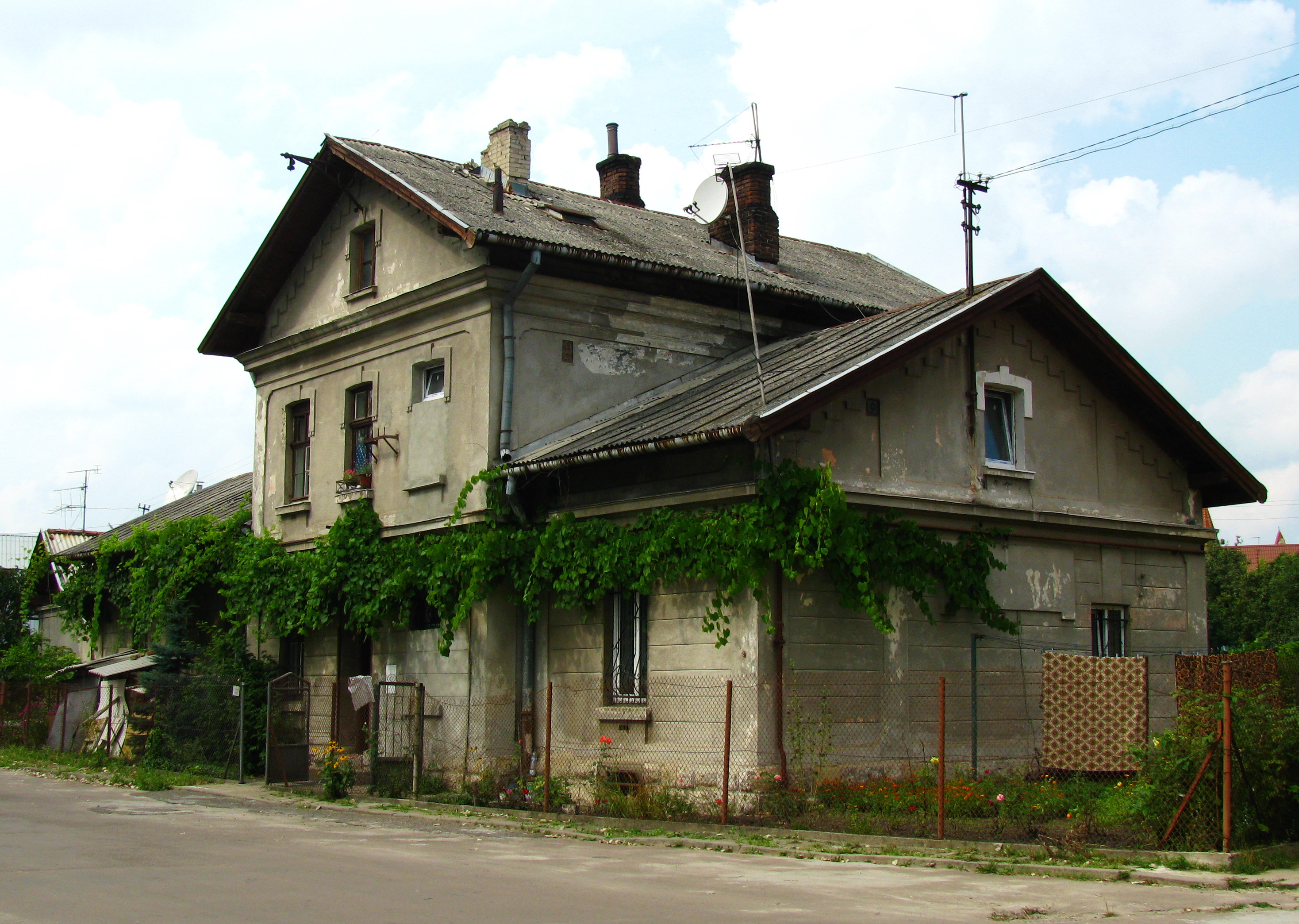 будівля колишньої станції Личаків у львові